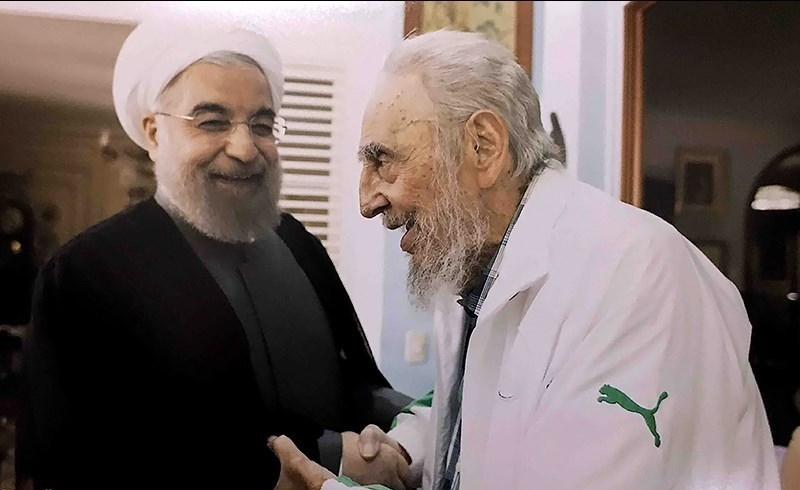 حسن روحانی و فیدل کاسترو در سفر رییس جمهور به کوبا در سال 1395